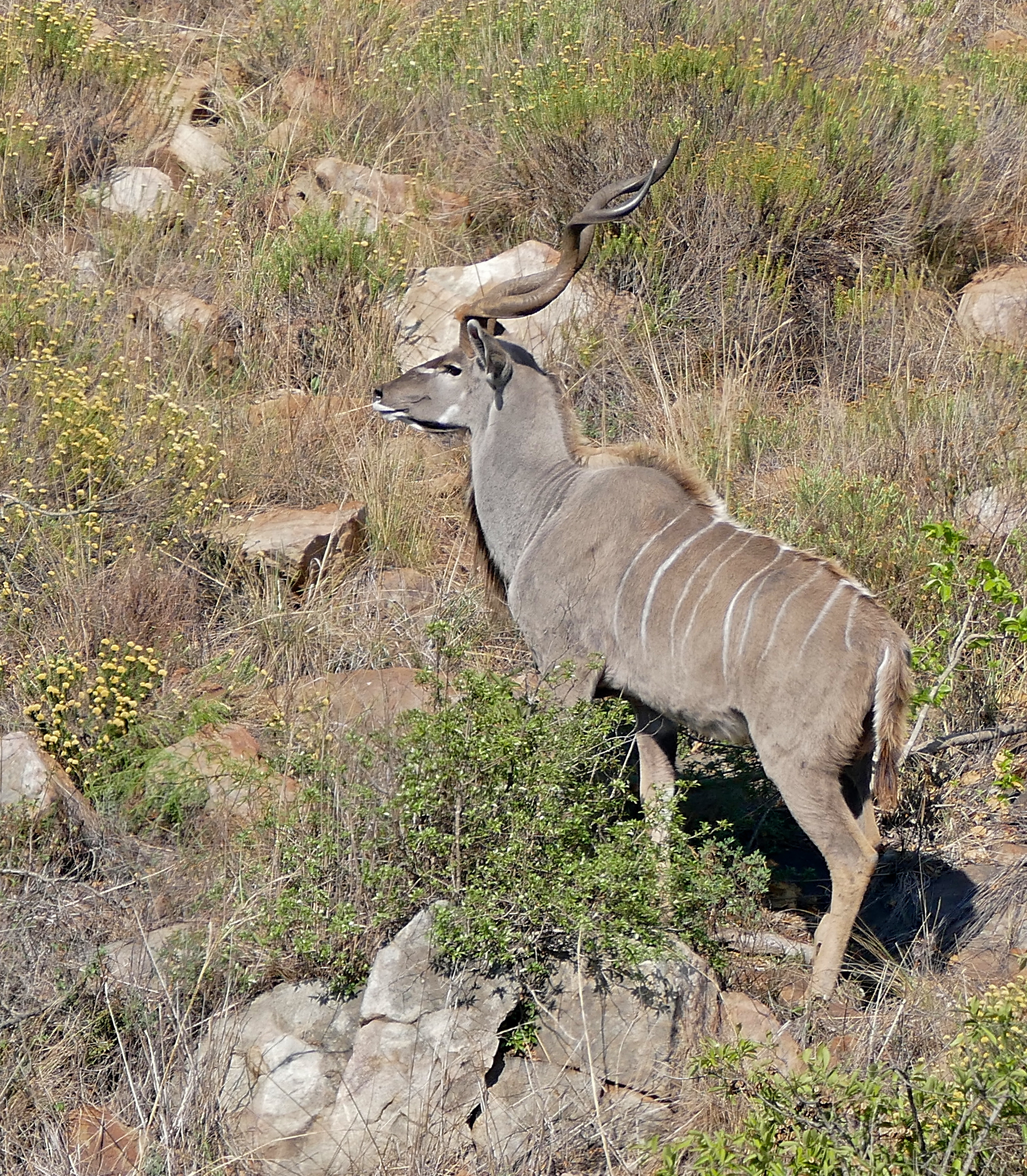 Ngulubeni Loop, Ithala Game Reserve, KwaZulu-Natal, SOUTH AFRICA